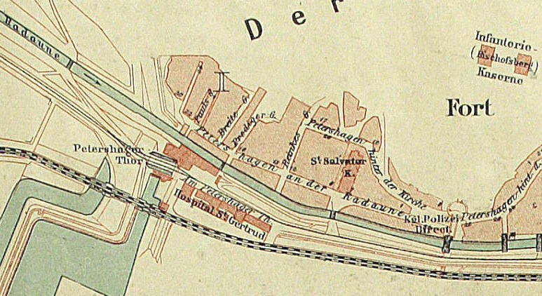 Zaroślak w Gdańsku, w 1897 r. W środku nieistniejący kościół p.w. Zbawiciela.